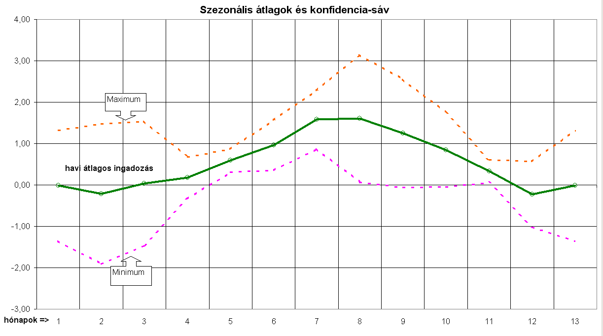 Time serie's seasonal component illustration